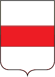 Concordia Sagittaria